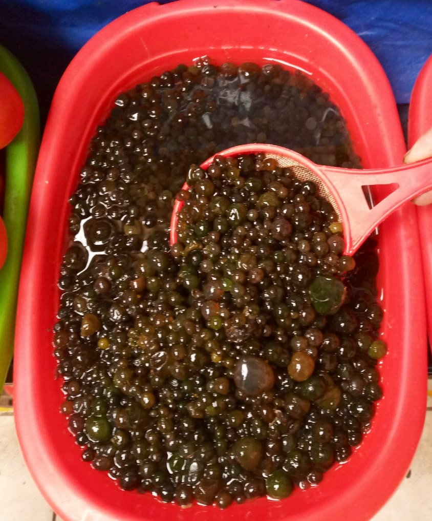 Cushuro en el mercado de Huaraz, foto tomada el jueves 6 de diciembre de 2018.